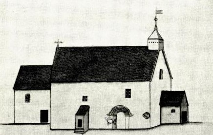 Sakshaug gamle kirke tegnet av Gerhard Schøning under hans besøk i Inderøy mai 1774